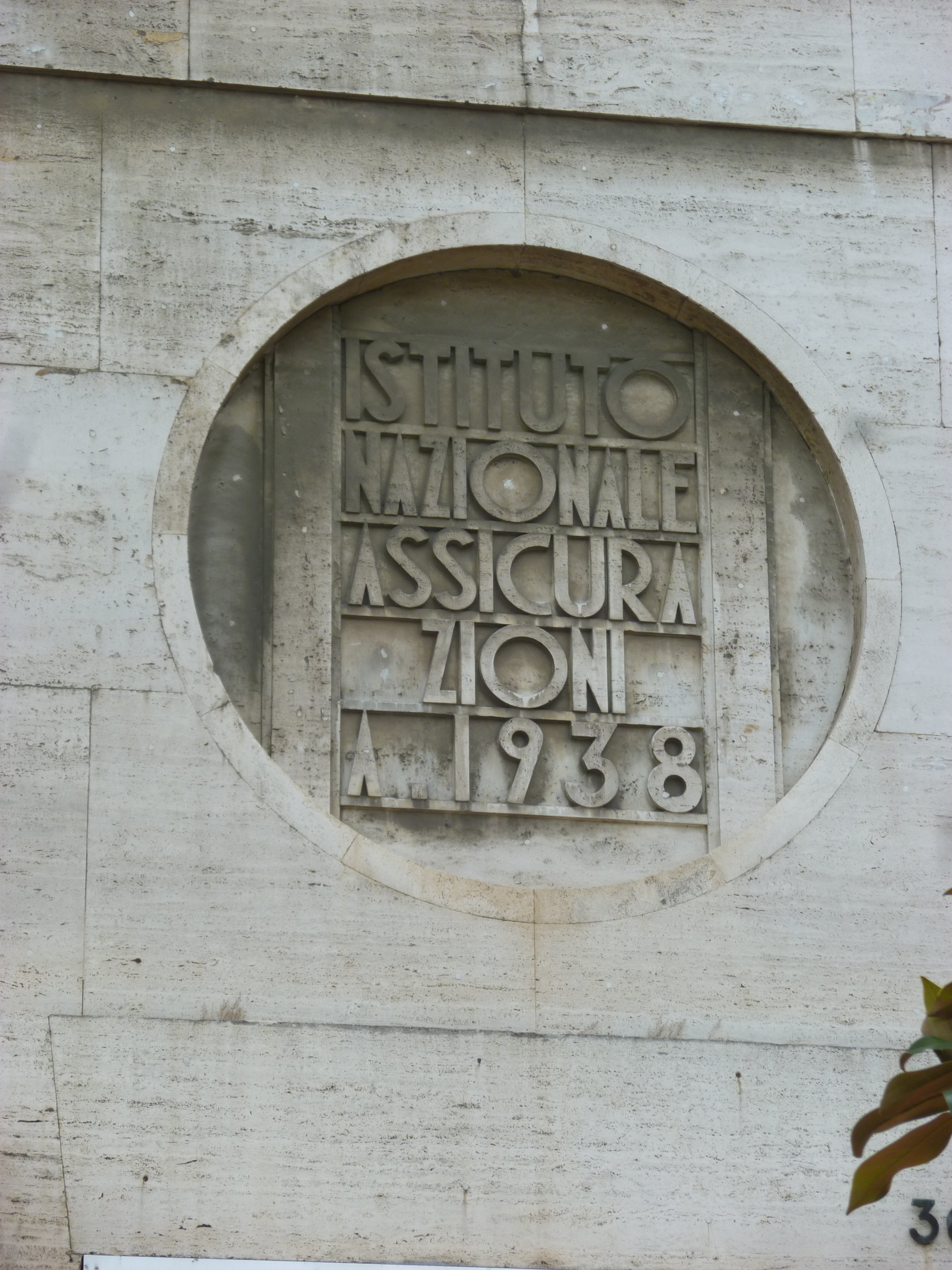 Napoli